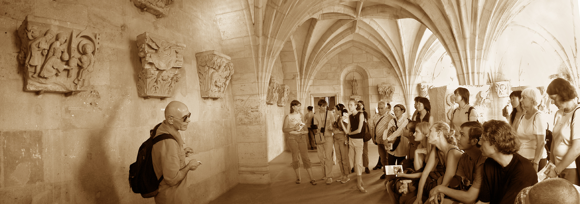 La salle capitulaire à la cathédrale Saint-Lazare d'Autun